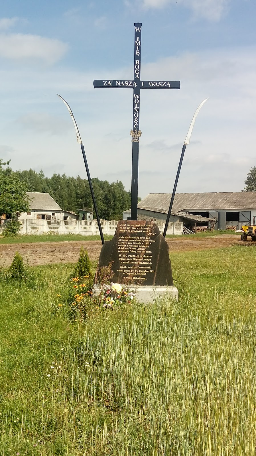 Kietlanka – przy torach znajduje się tablica upamiętniająca jedną z największych bitew Powstania Styczniowego, która rozegrała się 13 maja 1863 roku. W bitwie tej zginął ppłk Ignacy Mystkowski. Tablica została ufundowana przez parafian i ks proboszcza Andrzeja Dmochowskiego.